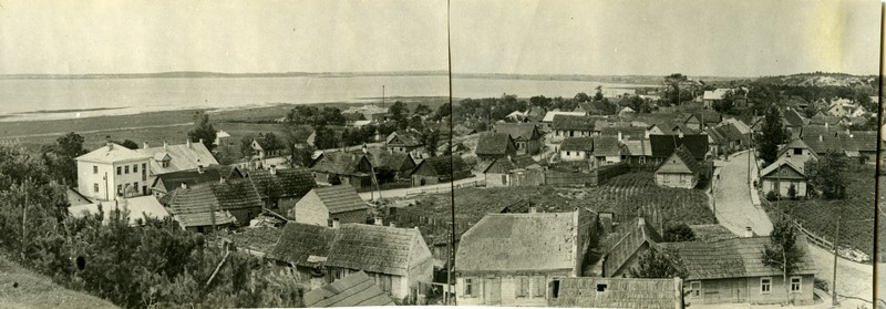 Беларуская (тарашкевіца): Браслаў (Brasłaŭ), паміж вуліцамі Вялікай (vulica Vialikaja) і Паштовай (vulica Paštovaja)